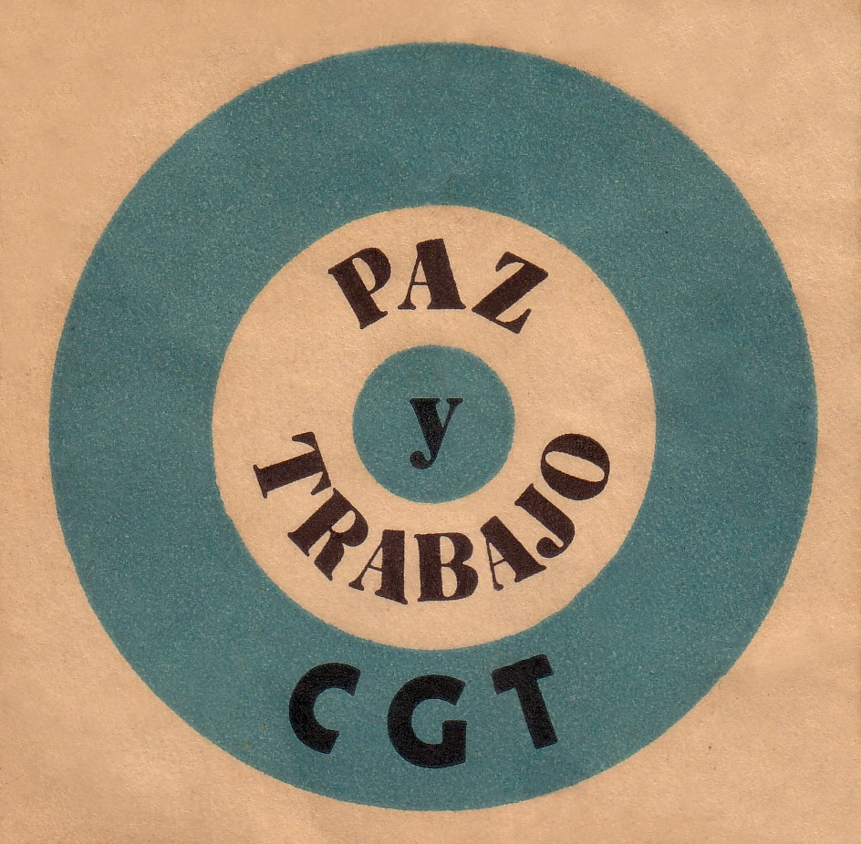 Mariposa de la CGT, septiembre de 1981, marcha de San Cayetano. Se trata de un escudo argentino con la consigna de la Marcha "Pan y Trabajo." Foto tomada por Pepe Robles sobre material propio en su poder. Subida por el autor.